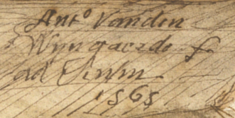 Firma de Anthonis van den Wijngaerde en 1565, en el dibujo sobre una vista general de Alcalá de Henares. La acuarela original está en la Biblioteca Nacional de Austria (Österreichische Nationalbibliothek).